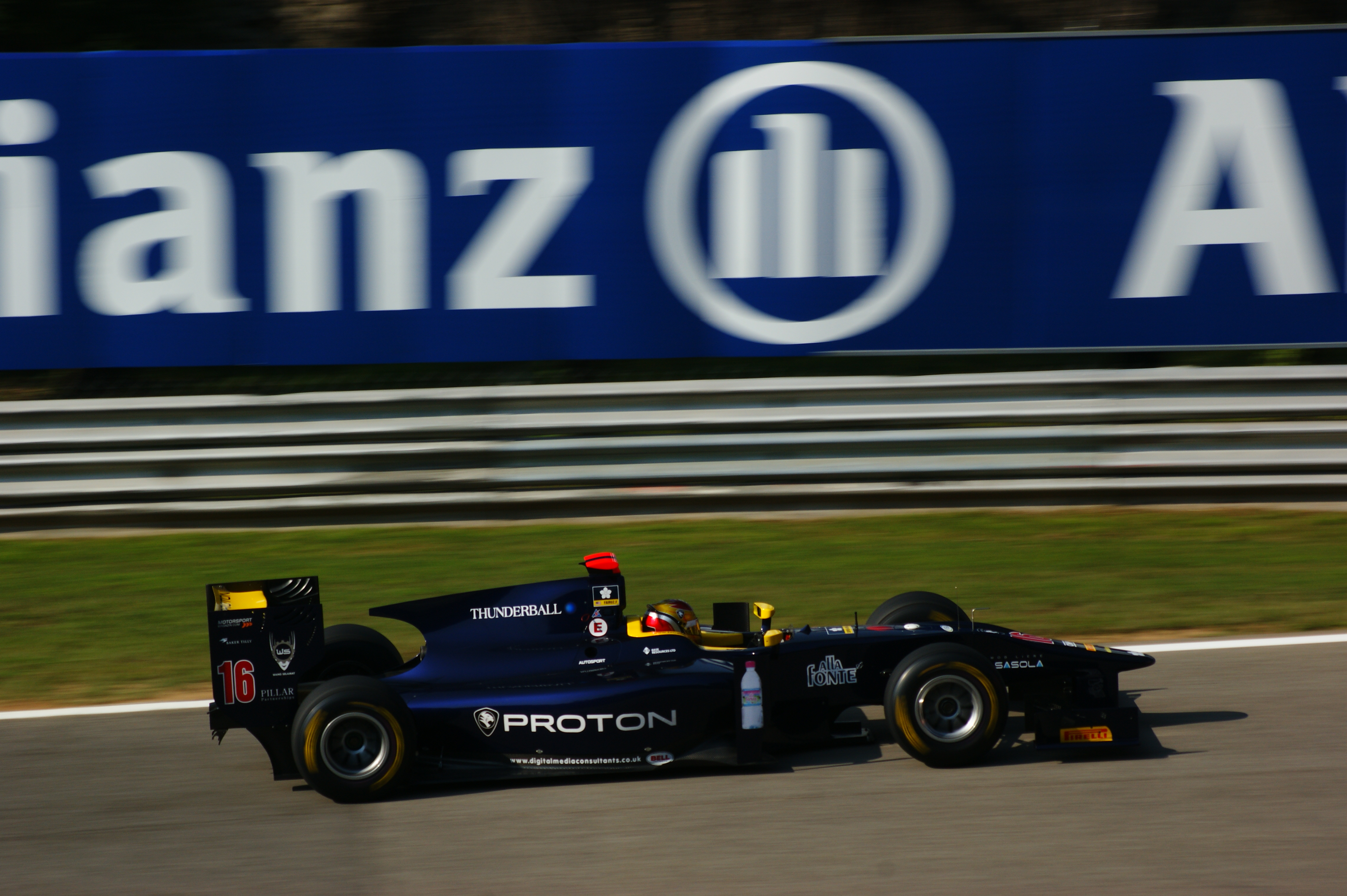 Fairuz Fauzy alla variante della roggia Monza 2011